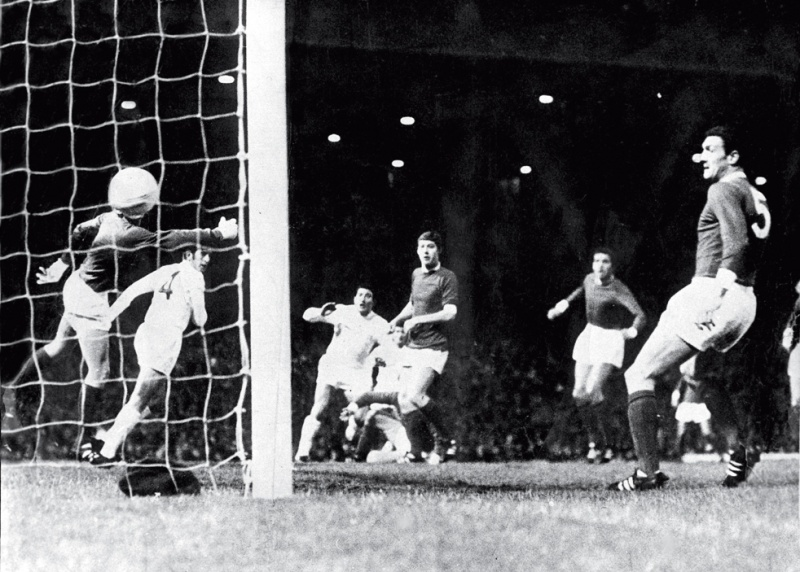 El gol de Juan Ramón Verón, de cabeza, en el Old Trafford de Manchester que definió la Intercontinental '68 a favor de Estudiantes de La Plata.